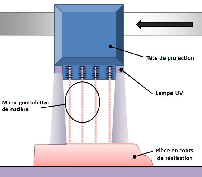 Schéma simplifié de représentation de cette méthode d'impression.